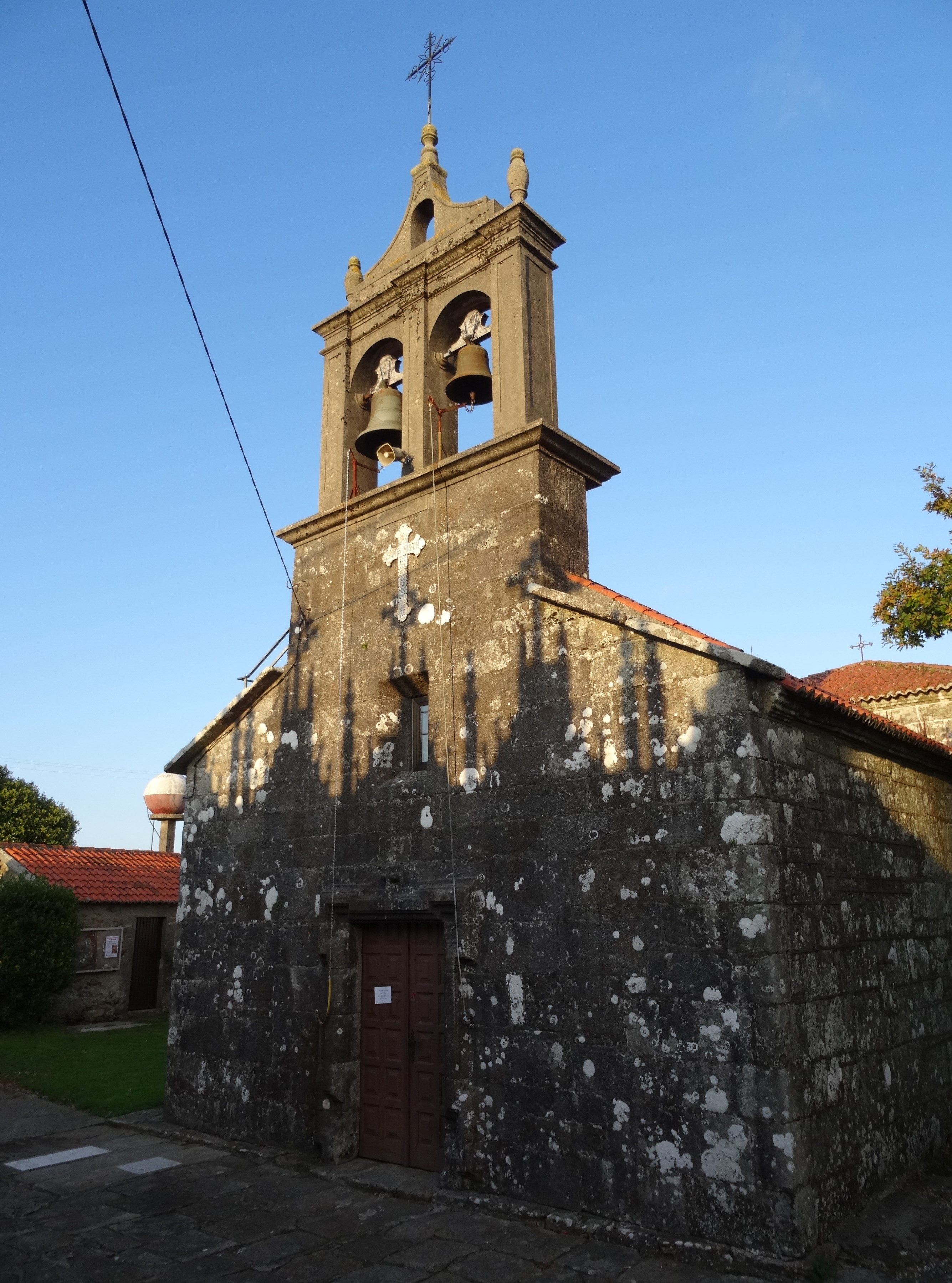 Igrexa de San Cosme de Antes, Mazaricos, Coruña